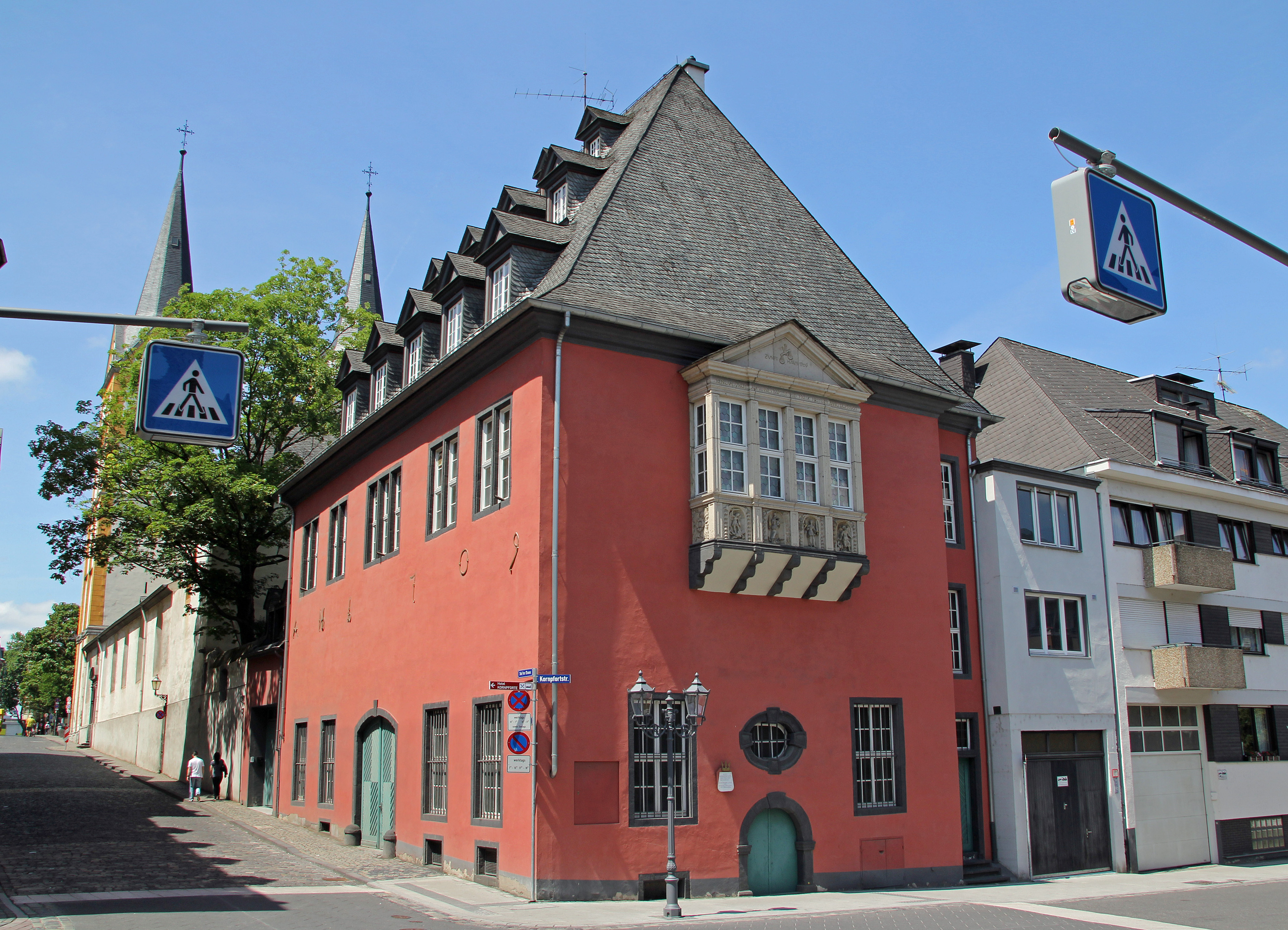 Koblenz im Buga-Jahr 2011 - Das Krämerzunfthaus